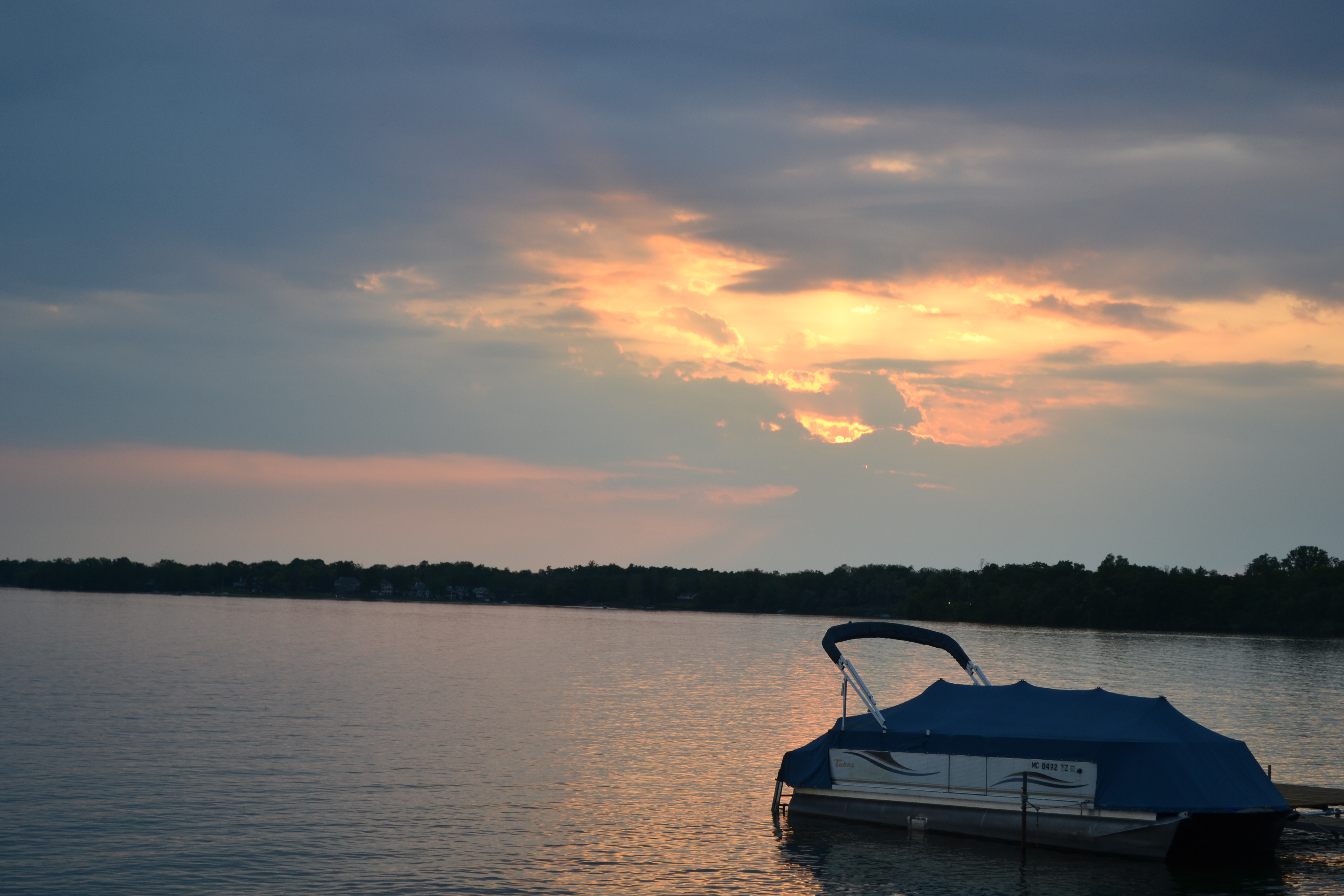 Sunset on Orchard Lake, Michigan